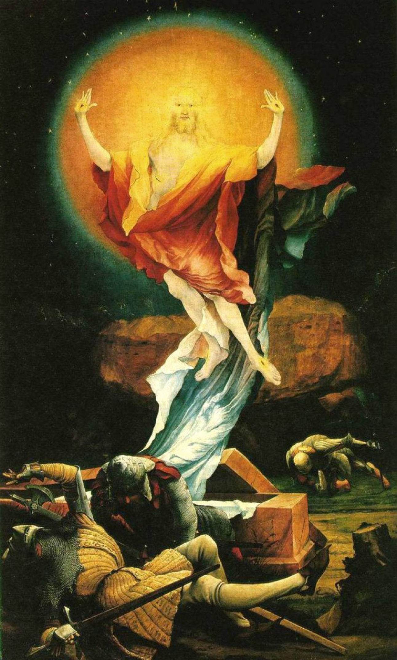 Isenheimer Altar, Polyptychon